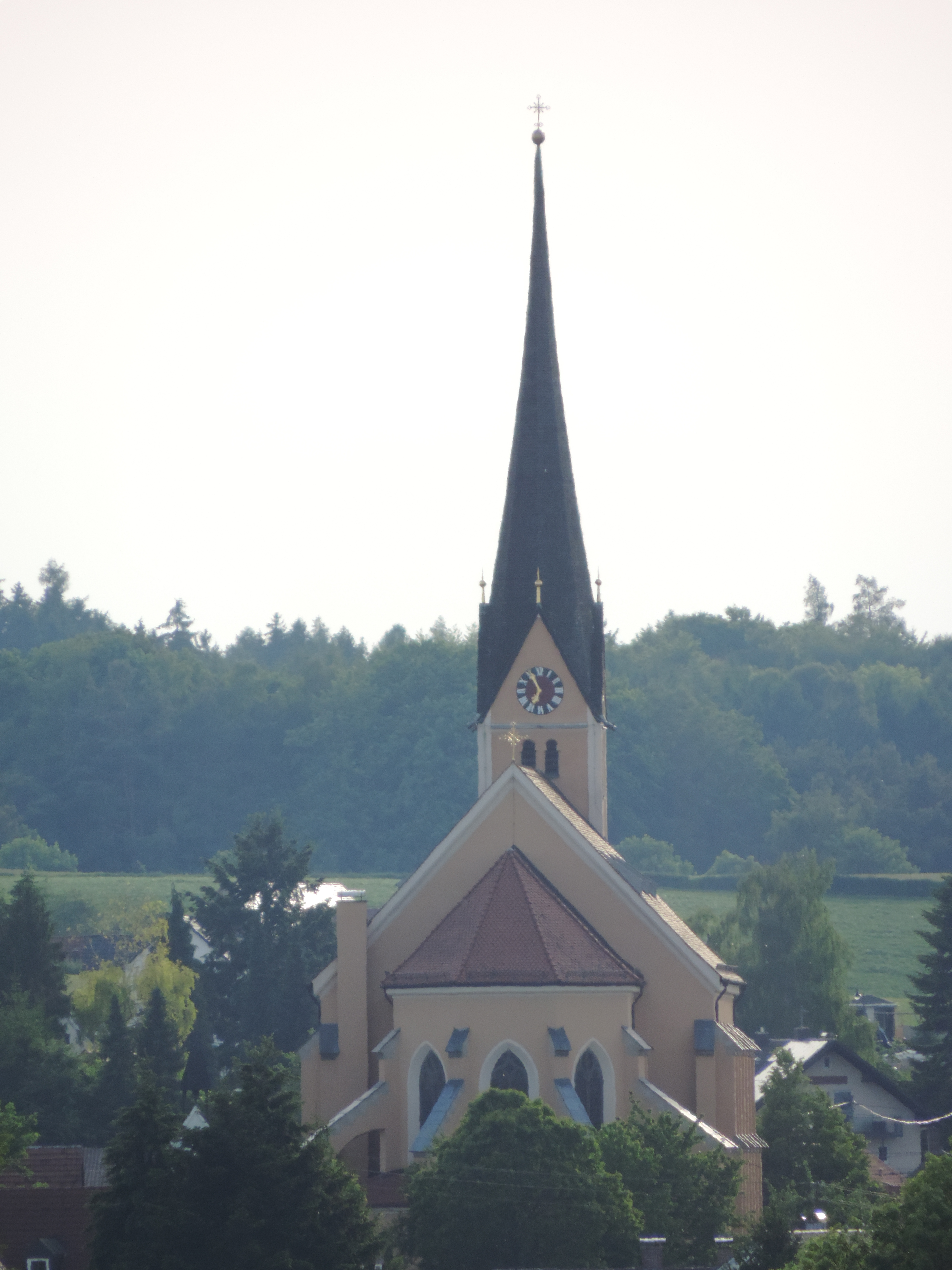 Ostansicht Katholische Pfarrkirche St. Martin